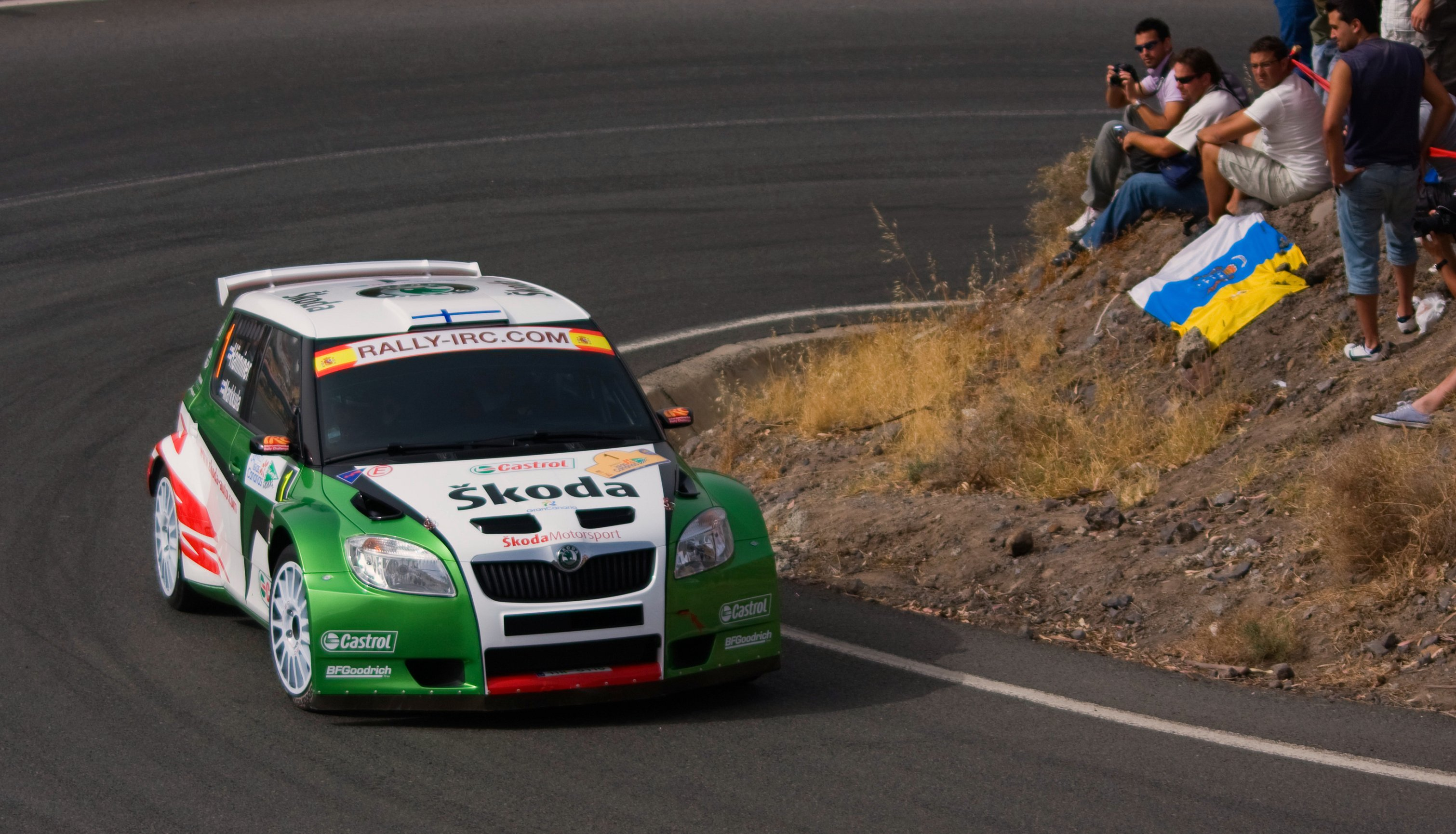 Juho Hänninen - podczas 34 Rajdu Wysp Kanaryjskich w 2010 roku